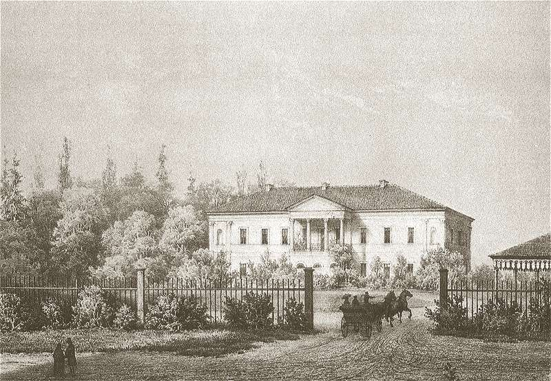 Manor in Jašiūnai, Lithuania